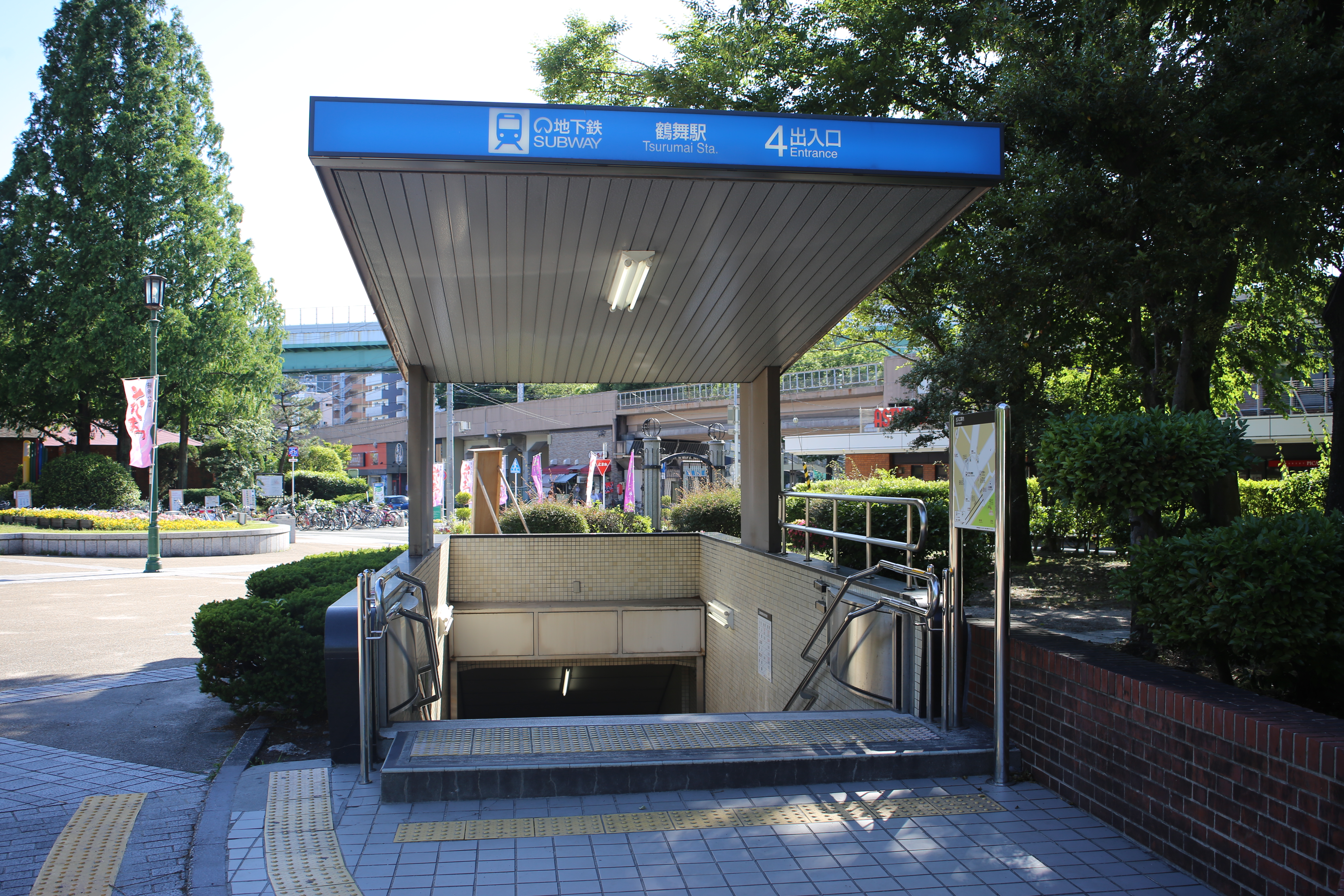 名古屋市営地下鉄鶴舞線鶴舞駅4番出入口